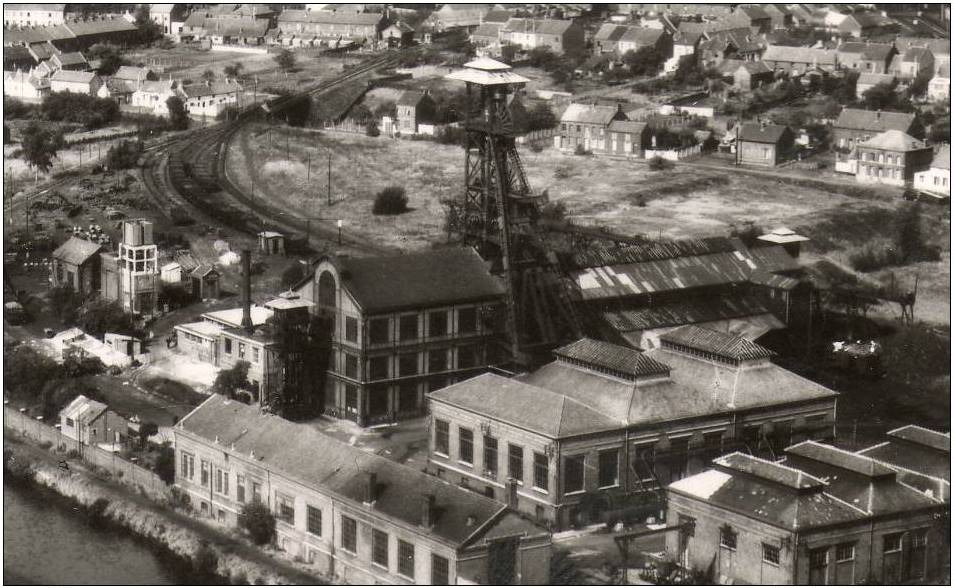 La fosse Vieux-Condé de la Compagnie des mines d'Anzin était un charbonnage constitué d'un seul puits situé à Vieux-Condé, Nord, Nord-Pas-de-Calais, France.